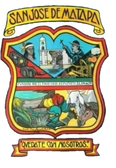 Escudo del municipio sonorense.